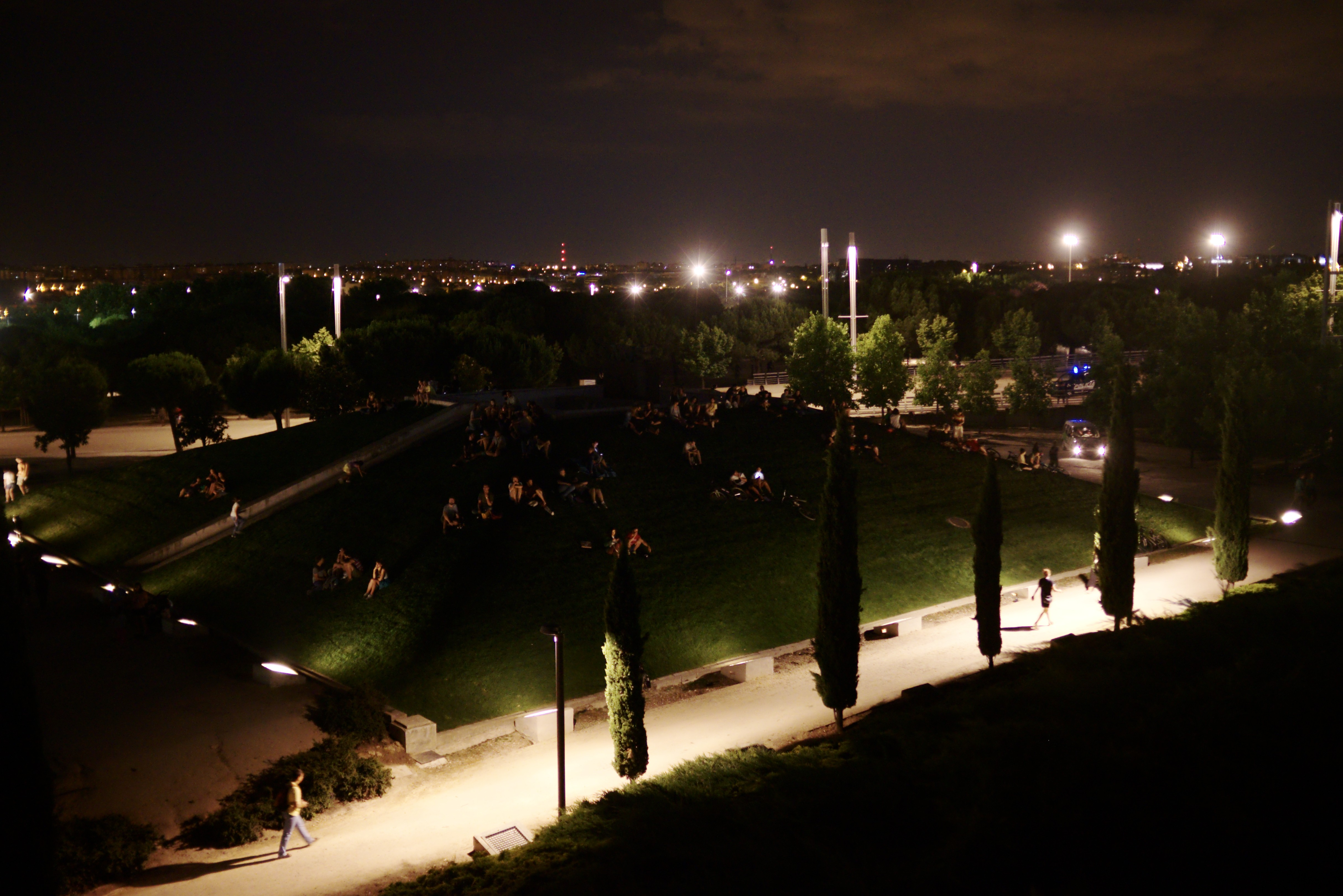 Madrid